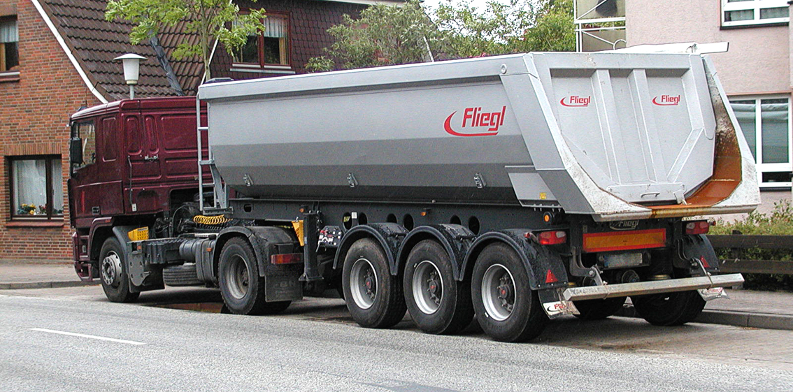 Ein Muldenkippauflieger